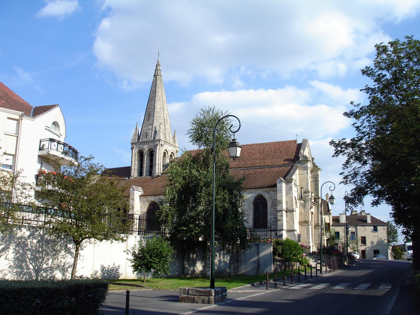 L'église Saint-Pierre-Saint-Paul (Rue de la Résistance) à Sarcelles (Val-d'Oise), France